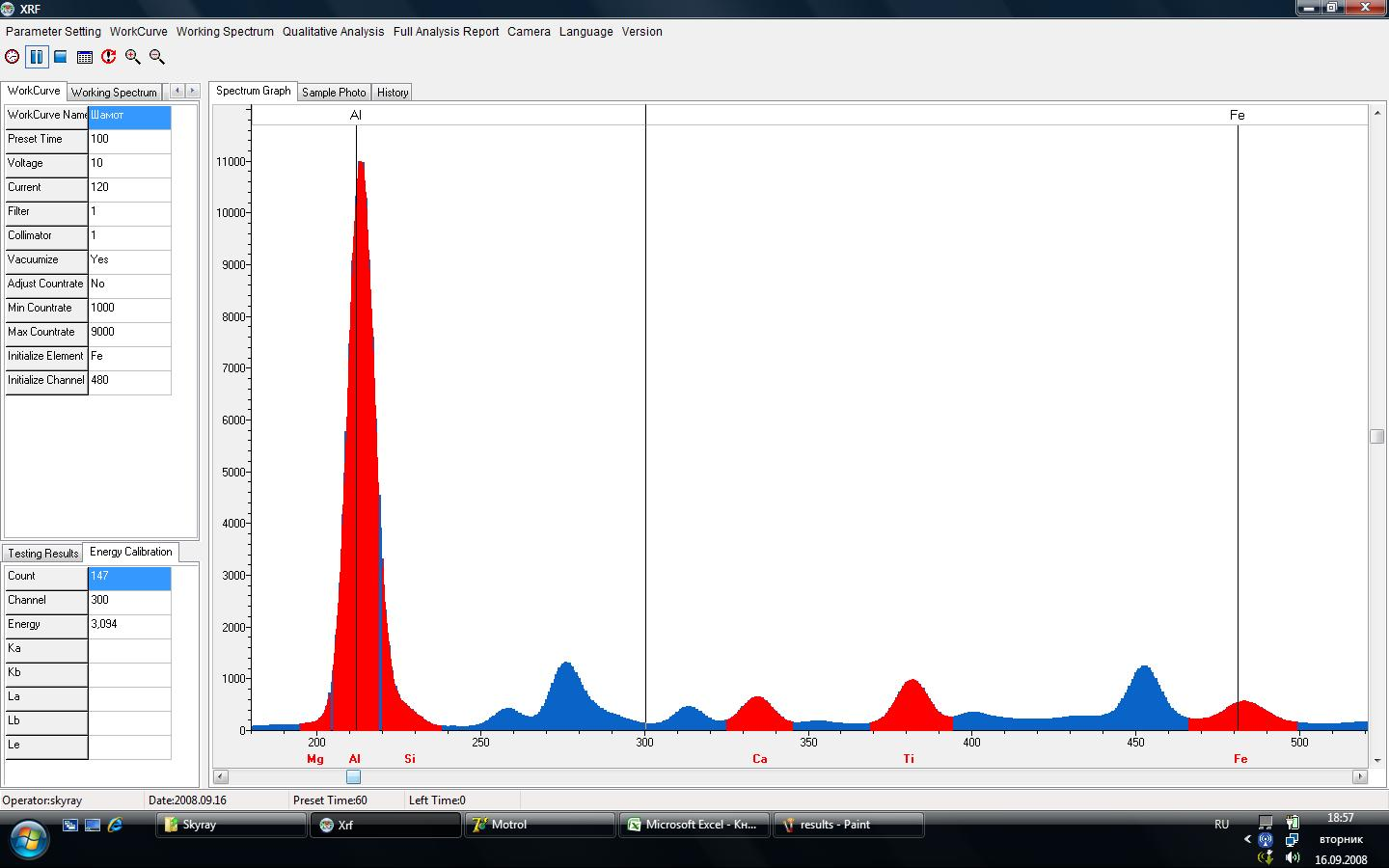 Спектр выполненый спектрометром Skyray EDX-Pocket-III